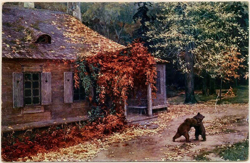 Litewskie zacisze Ok. 1908. Obraz zaginiony. Skanowano z przedwojennej pocztówki wydanej przez ZAKŁADY REPRODUKCYJNE "AKROPOL", KRAKÓW XXII. Ser. 125/2. Wydawnictwo Salonu Malarstwa (dalej nieczytelne).